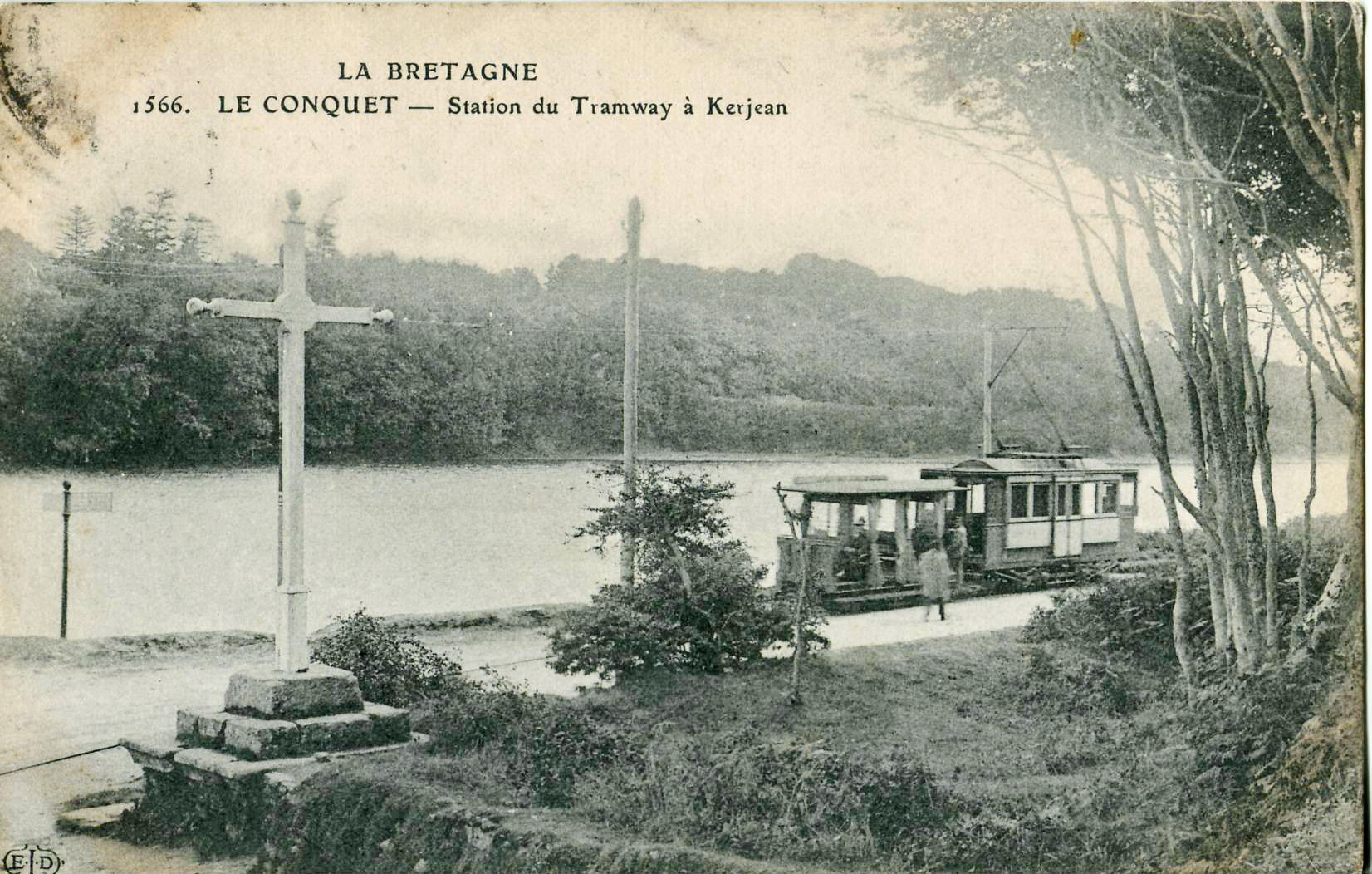 Carte postale ancienne éditée par ELD, collection La Bretagne, n°1566 : LE CONQUET - Station du tramway à Kerjean